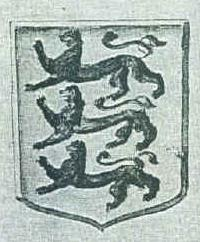 Wappen des ehemaligen Bezirk Pfäffikon im Kanton Schwyz (Kanton Ausserschwyz)